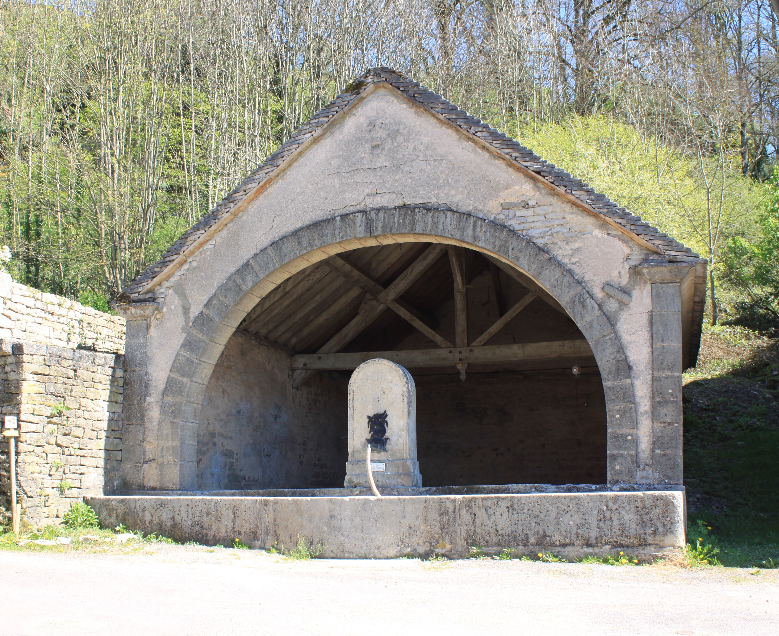 Salmaise, Cote-d'Or, Bourgogne, France